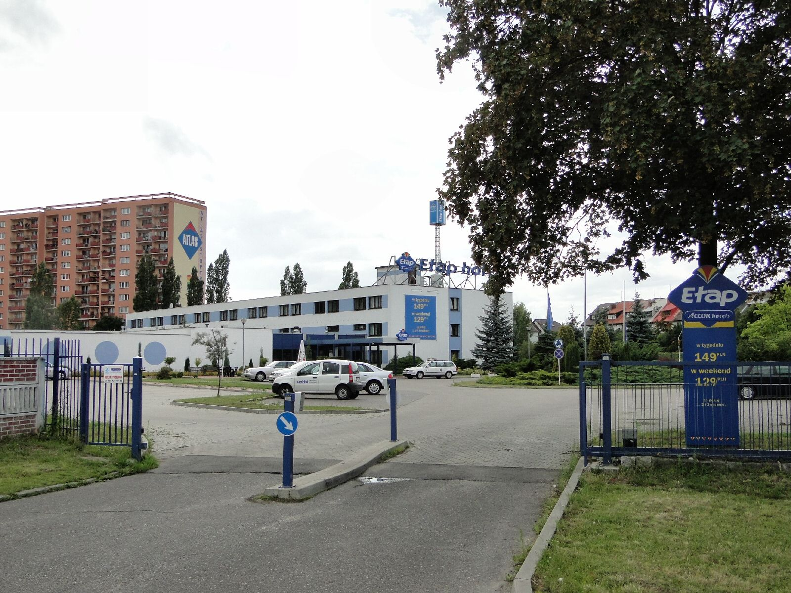 Osiedle Reda w Szczecinie